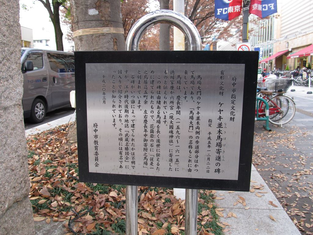 東京都府中市 Fuchu-city, Tokyo